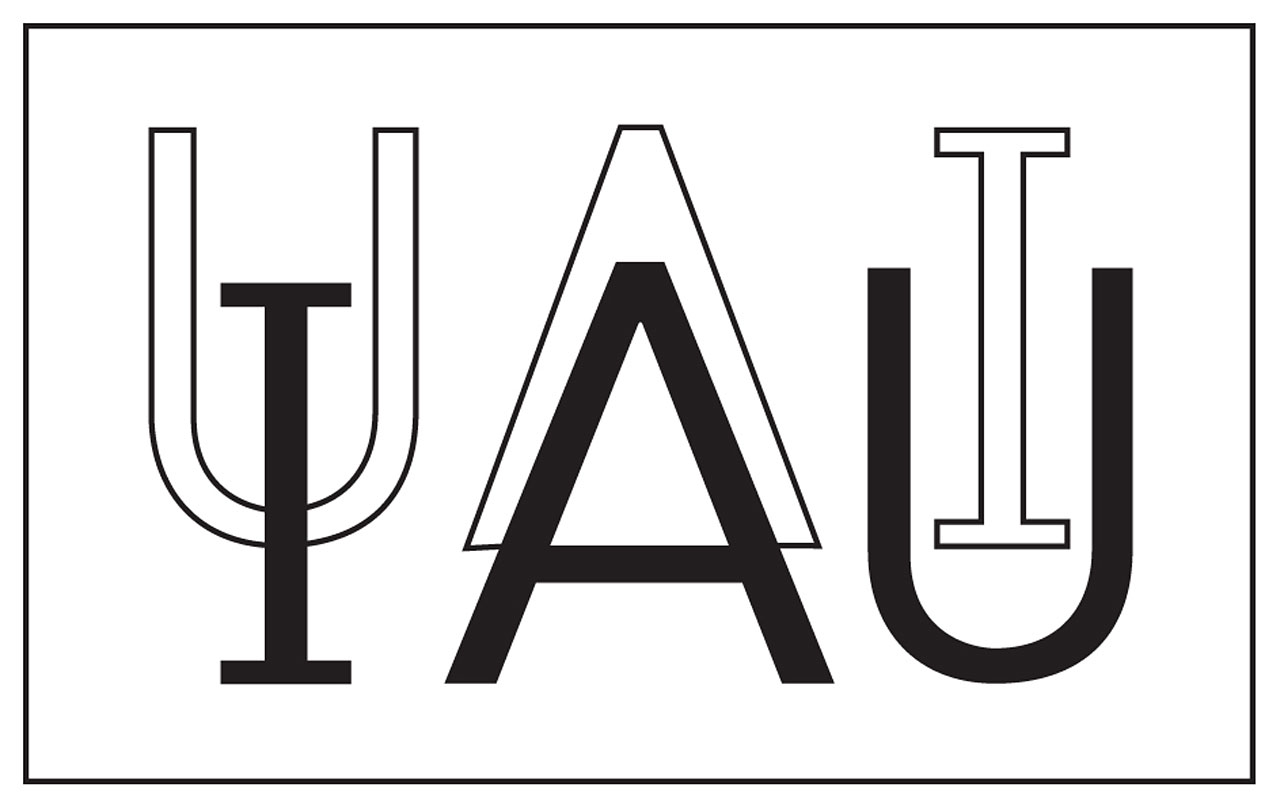 Logotipo da União Astronomica Internacional